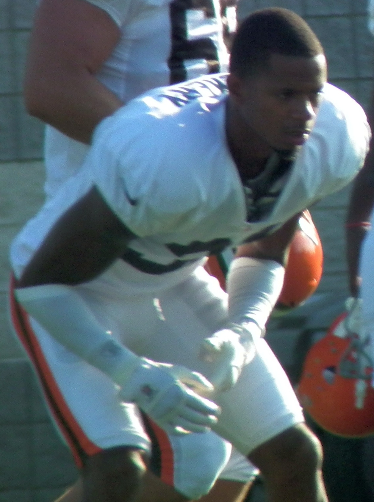 James Dockery